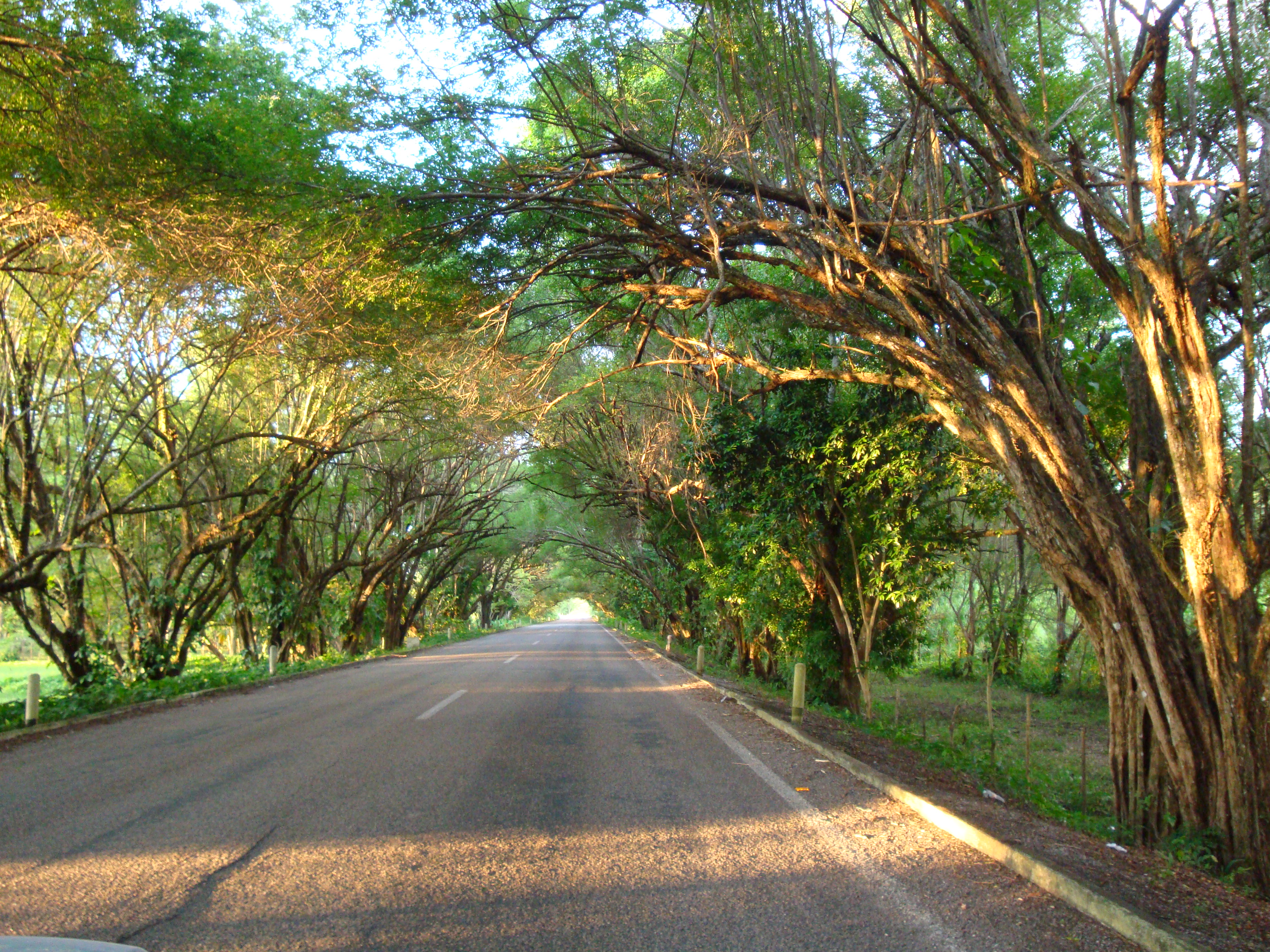 Tunel vegetal sobre la carretera Jalapa-Villahermosa, municipio de Jalapa, Tabasco